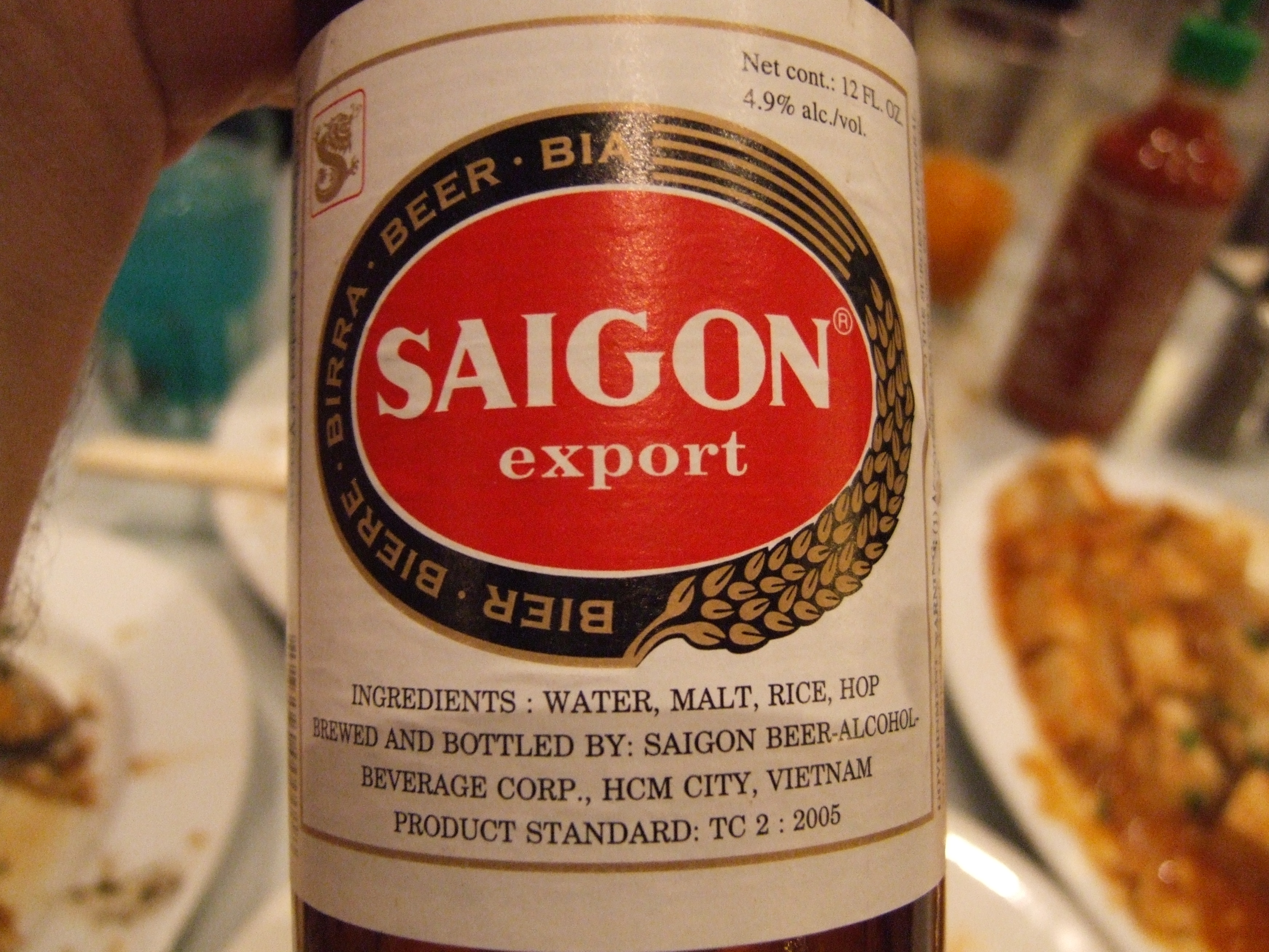 Saigon lager beer, red label.